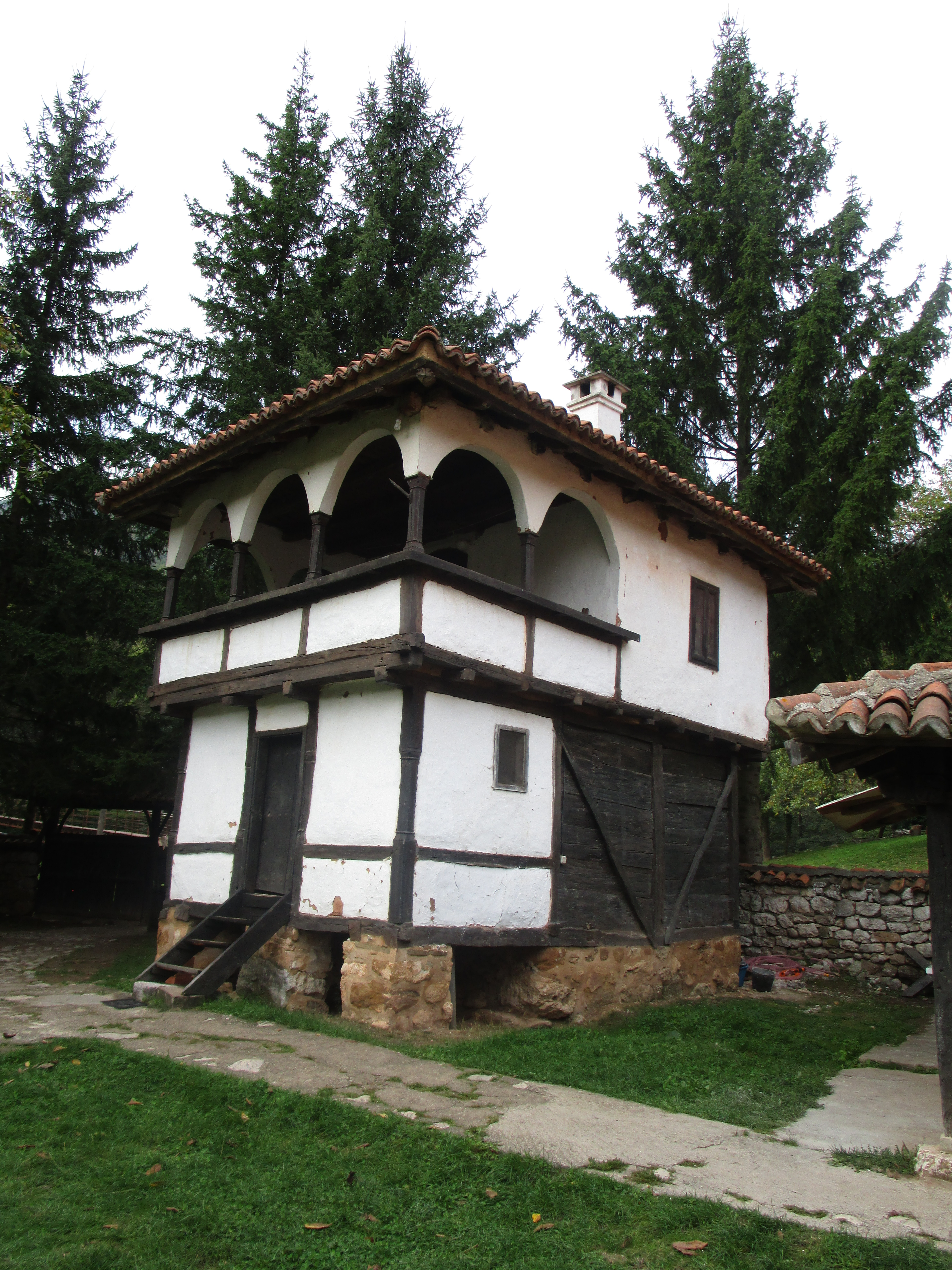 Српски (ћирилица): Манастир Поганово